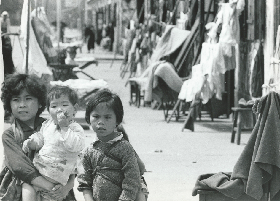 Katalogfoto "Flüchtlingskinder aus Rot-China im Lager Macao" zur Ausstellung World Photo Press 1962, Den Haag, Seite 66